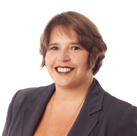 Cécile Jodogne, Secrétaire d'Etat à la Région de Bruxelles-Capitale et Ministre de la Commission Communautaire Française.